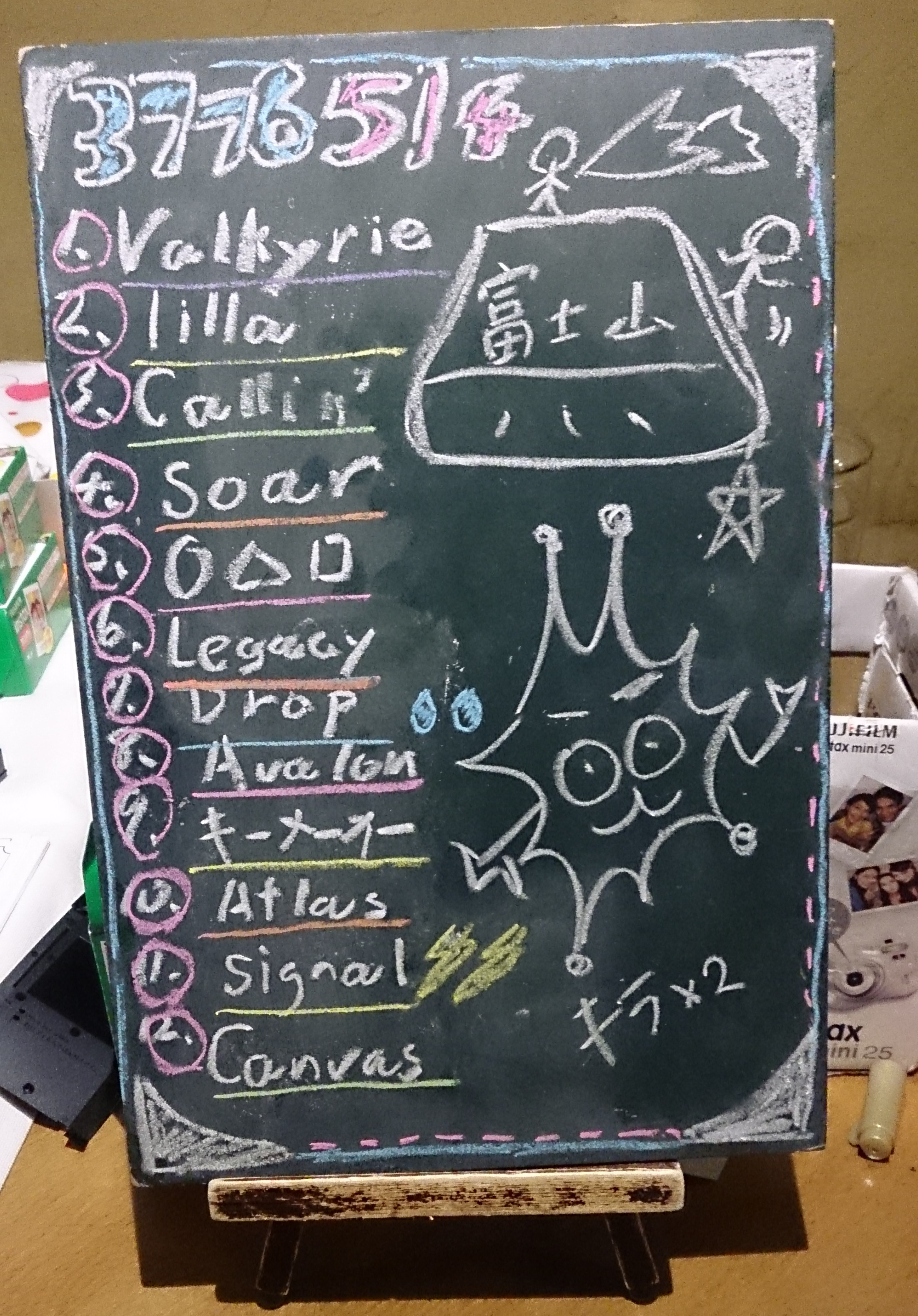 amiinAセトリボード(20170514(1))